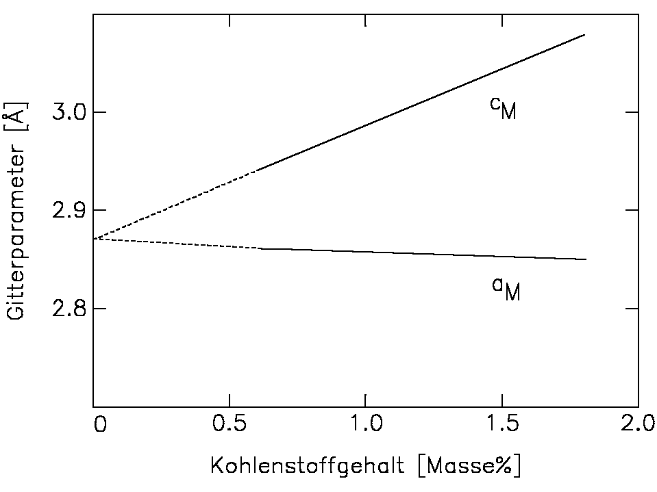 Einfluss des Kohlenstoffgehaltes auf die Gitterparameter von Martensit bei reinen Eisen - Kohlenstofflegierungen